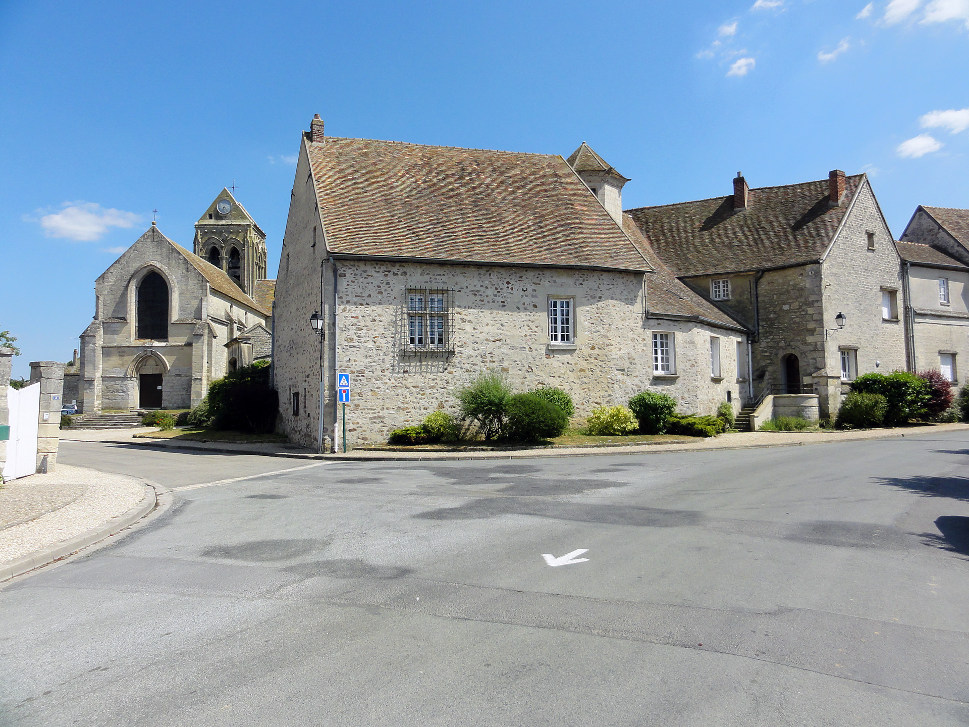 La ferme de l'Hôtel-Dieu et l'église Sainte-Marie-Madeleine, Le Bellay-en-Vexin, France.